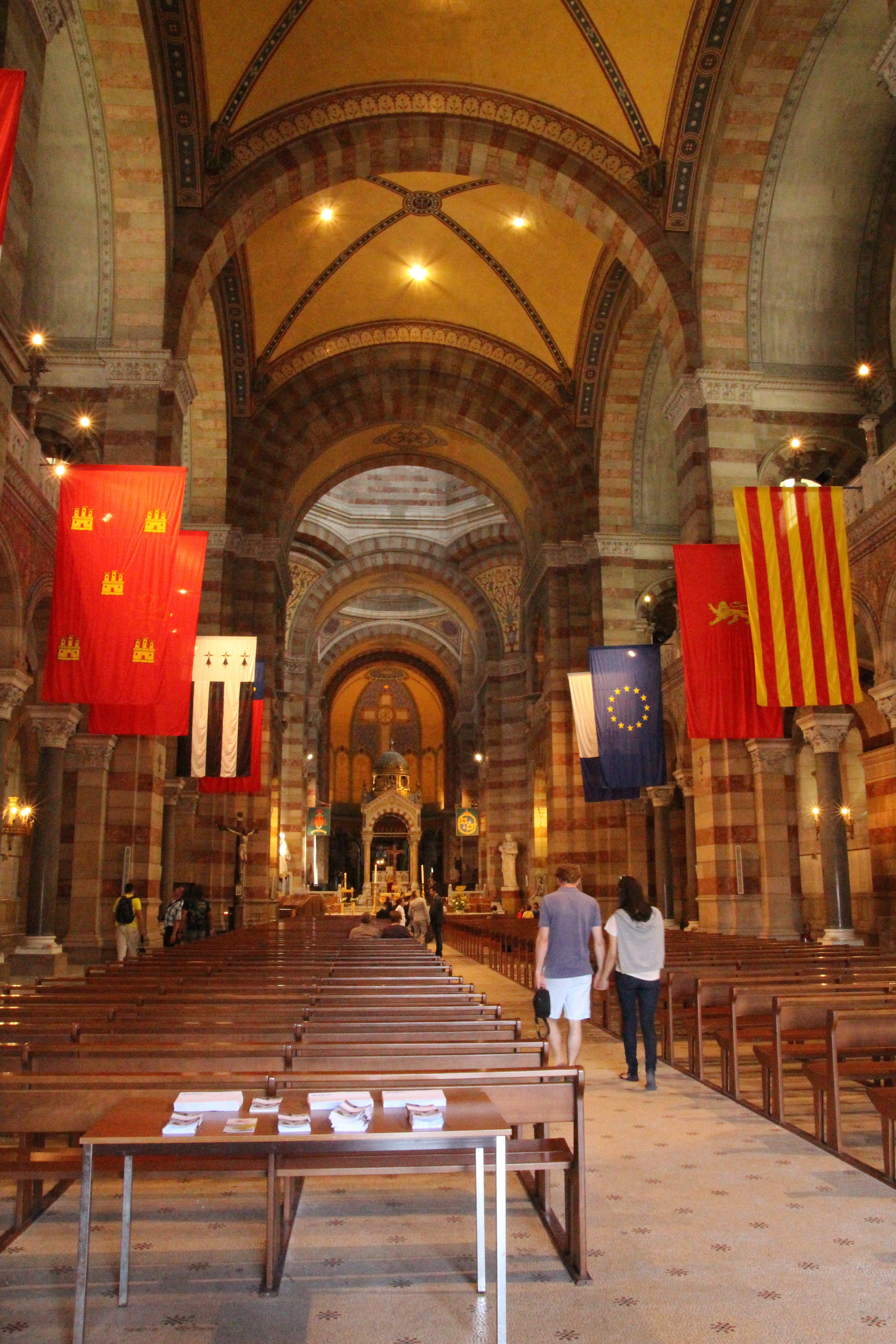 Cathédrale Sainte-Marie-Majeure